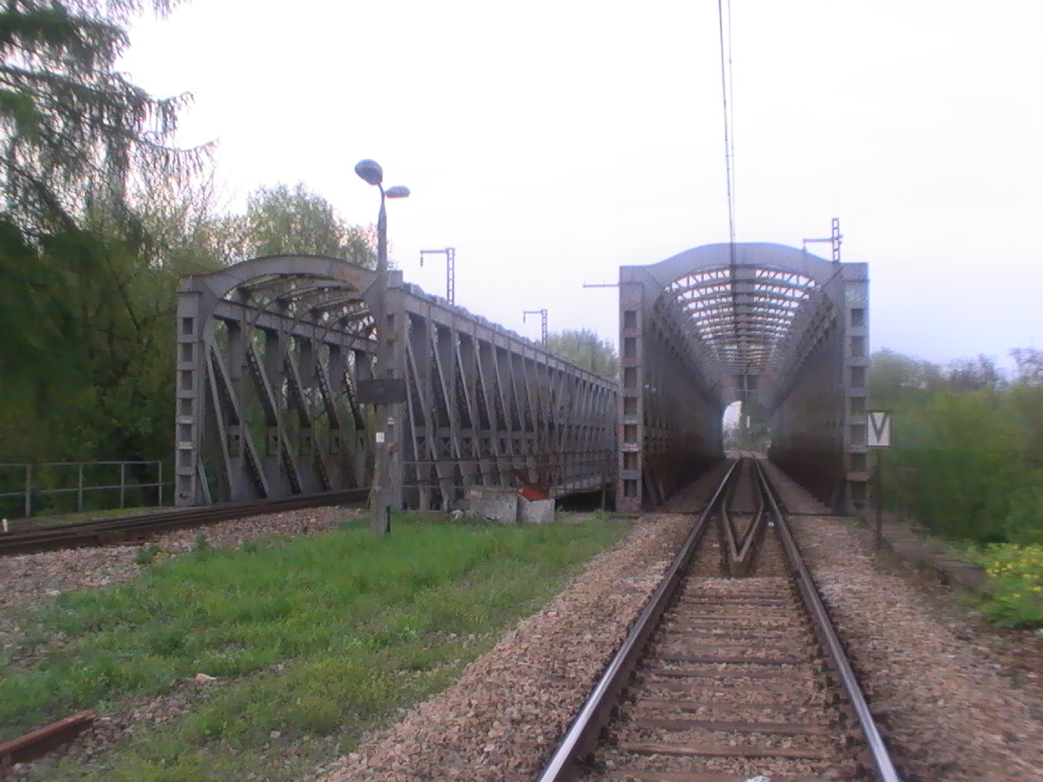 Most kolejowy na rzece Wisłok w Rzeszowie w pobliżu stacji Rzeszów Główny